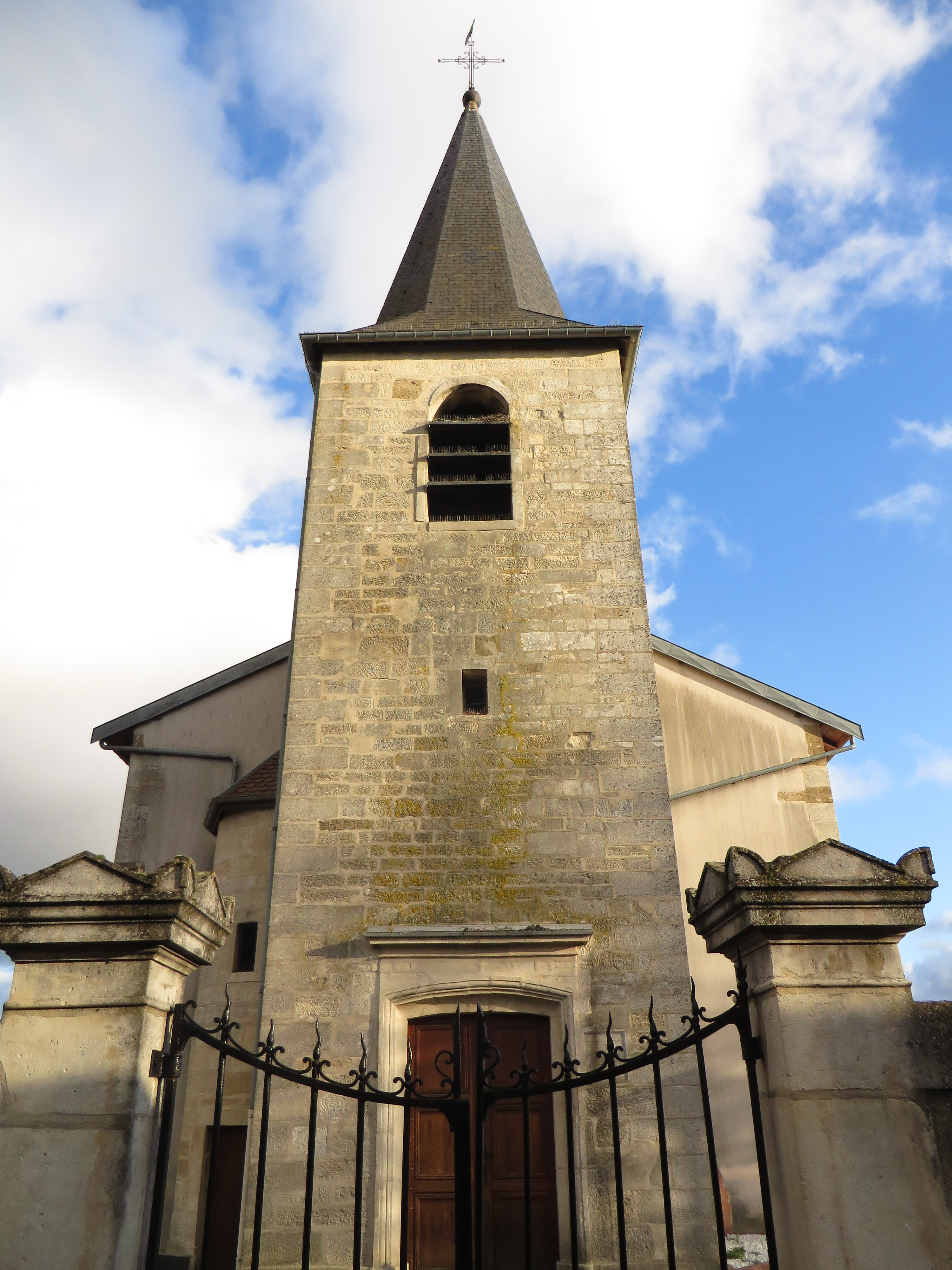 Jaillon eglise